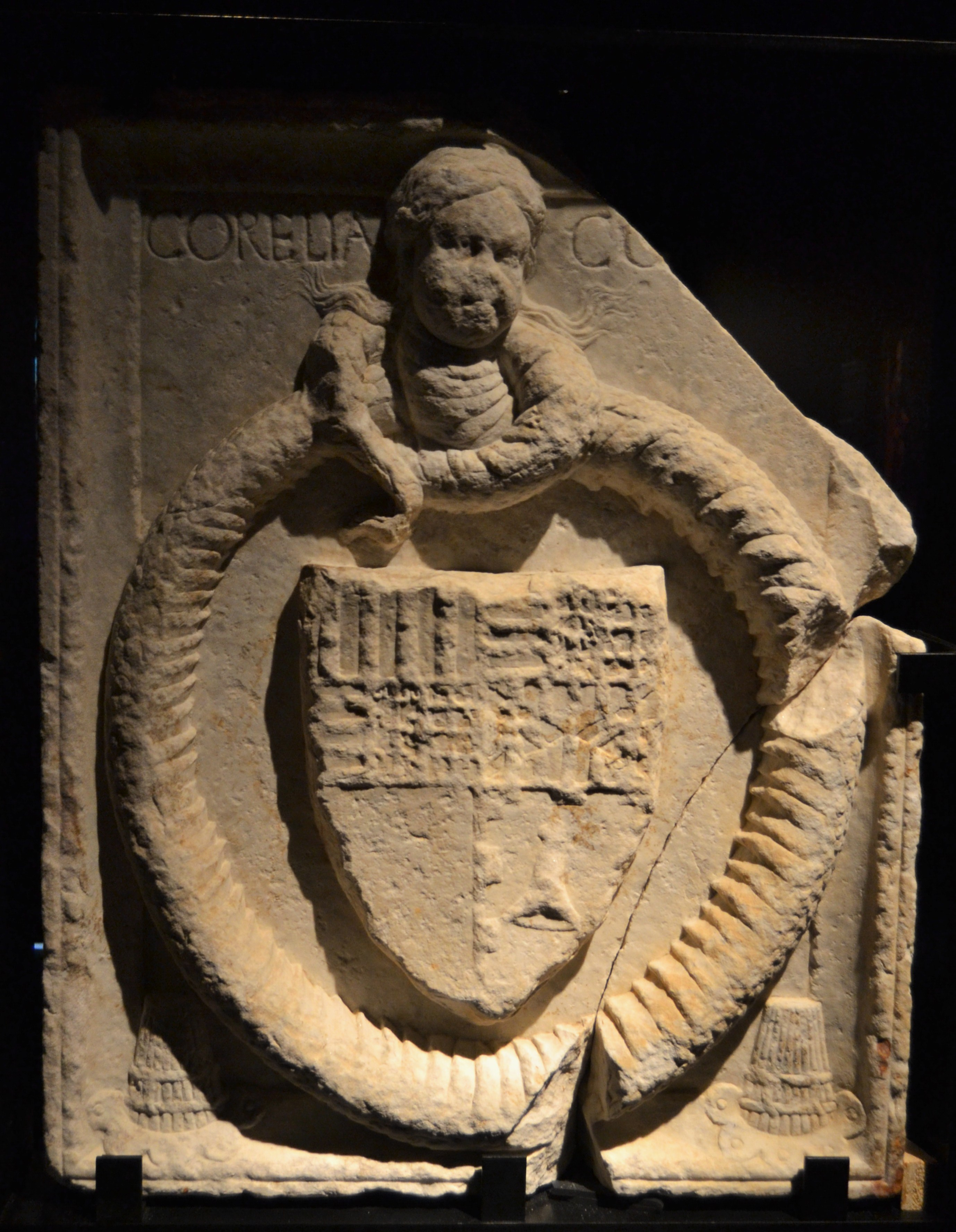 Escut dels Corella, marbre, segle XV, palau comtal de Cocentaina. Museu municipal de Cocentaina. Escut d’armes fragmentat i incomplet realitzat en marbre i decorat amb motius heràldics que pertanyen als Corella, comtes de Cocentaina. Presenta un requadre de doble i filet fi que emmarca un cos de serp amb cap de dona amb la seua cua enroscada al coll que descriu un cercle. Entre aquest i els angles del requadre, en la part superior esquerra apareix la inscripció “Corella” i a la dreta, només la lletra Inicial “C”, i a cada costat de la part Inferior, motius estilitzats típics de l'època. La serp envolta un escut quarterat amb els elements següents: en el cap, en el cantó dret dues barres o pals verticals, en el centre dues barres verticals i quatre barres en horitzontal i en el cantó esquerre dues flors de lis una sobre una altra i, a la seua dreta una creu a la manera del sant Sepulcre o Terra Santa. En el flanc dret es repeteix el mateix motiu del cantó esquerre. En el flanc esquerre, quatre dobles barres verticals en angle i dues àguiles sense corona. En el cantó dret de la punta no apareix cap motiu, mentre que en la part esquerra es representa una campana.